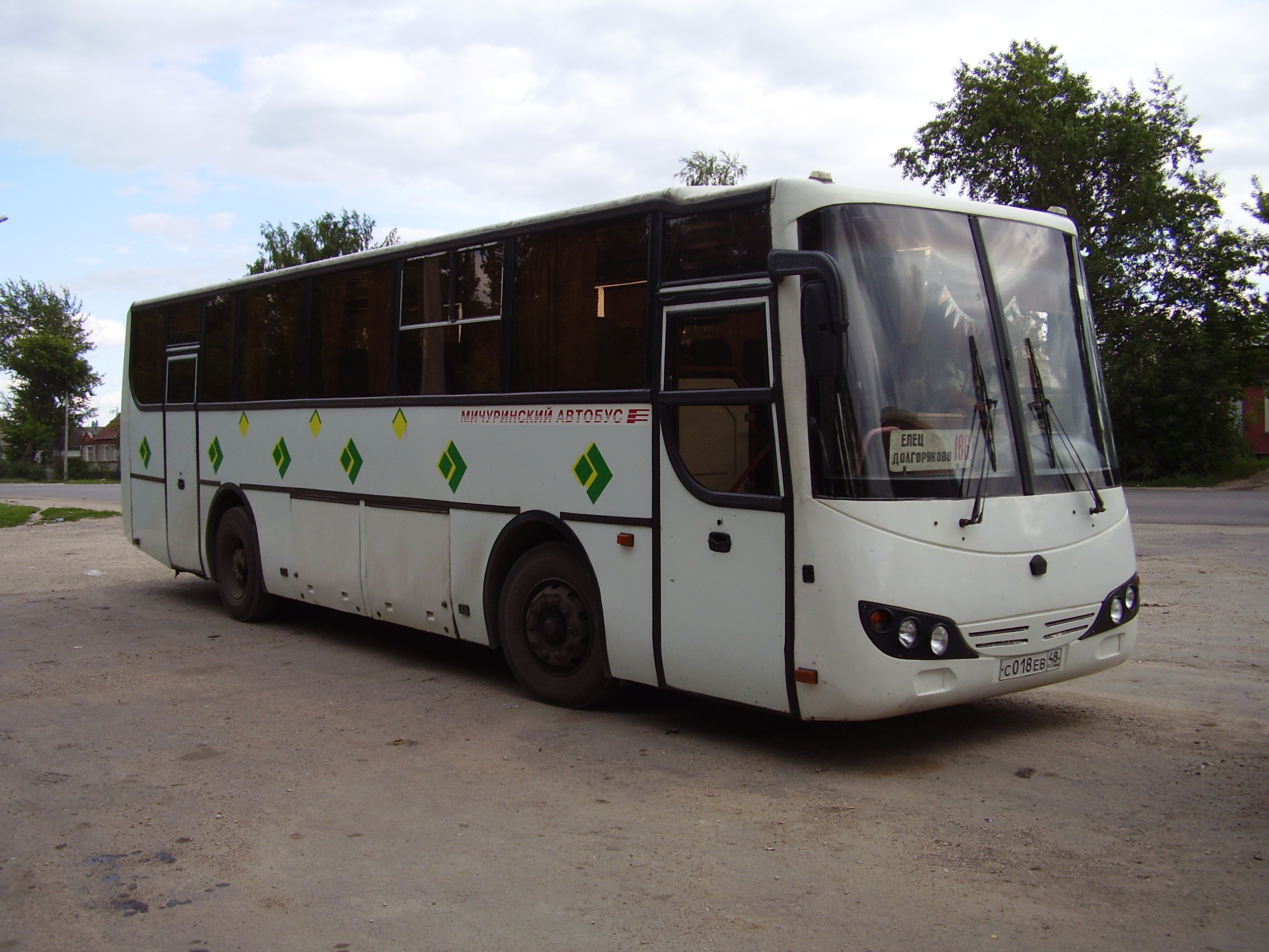 Автобус МАРЗ на маршруте Елец - Долгоруково